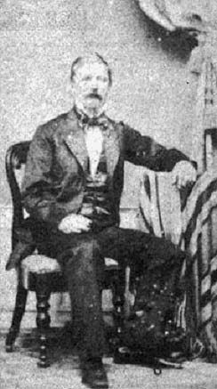 Dr. Gottfried Knoche (1813-1901).